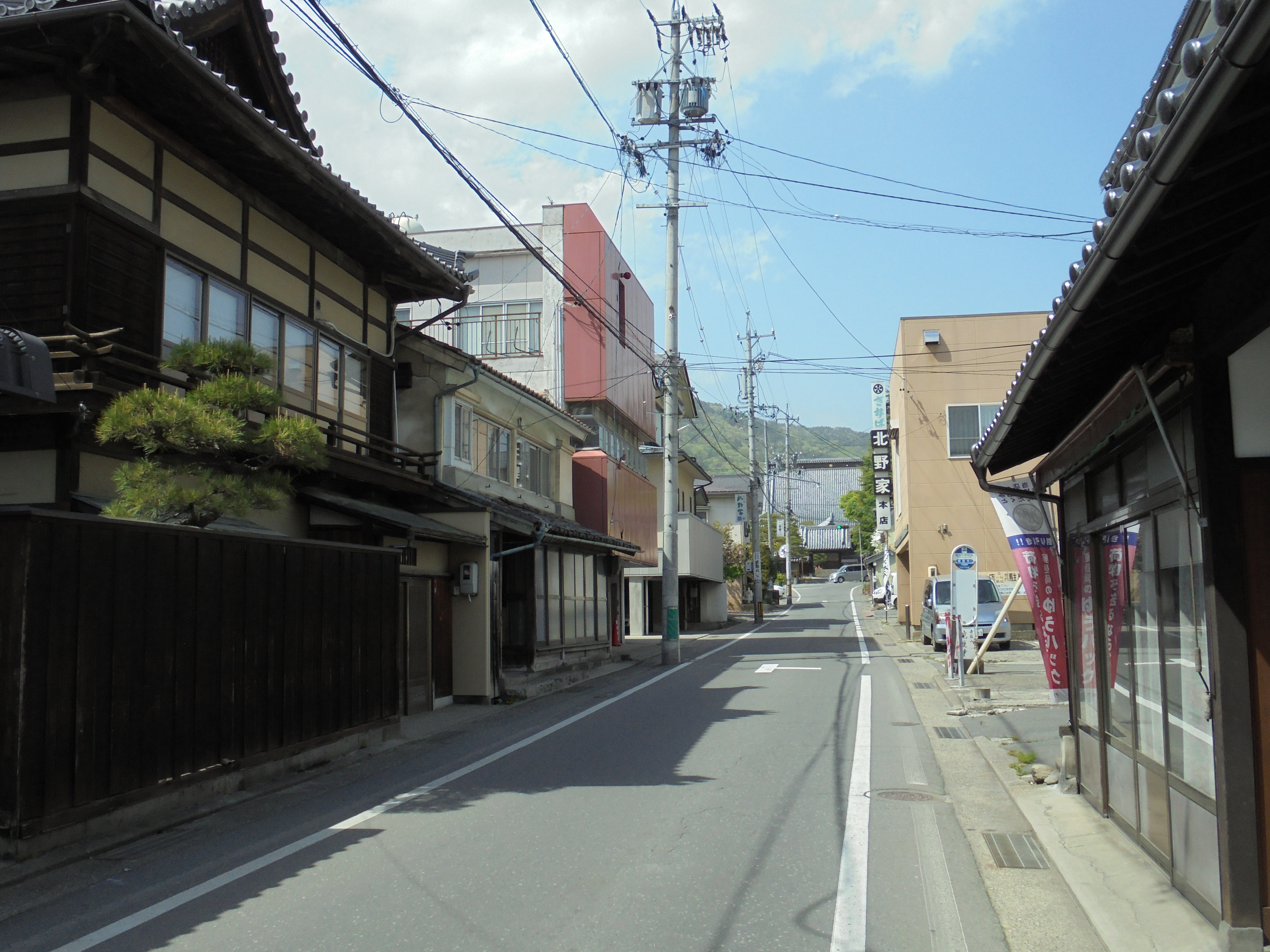 東之門通り（長野県長野市東之門町）